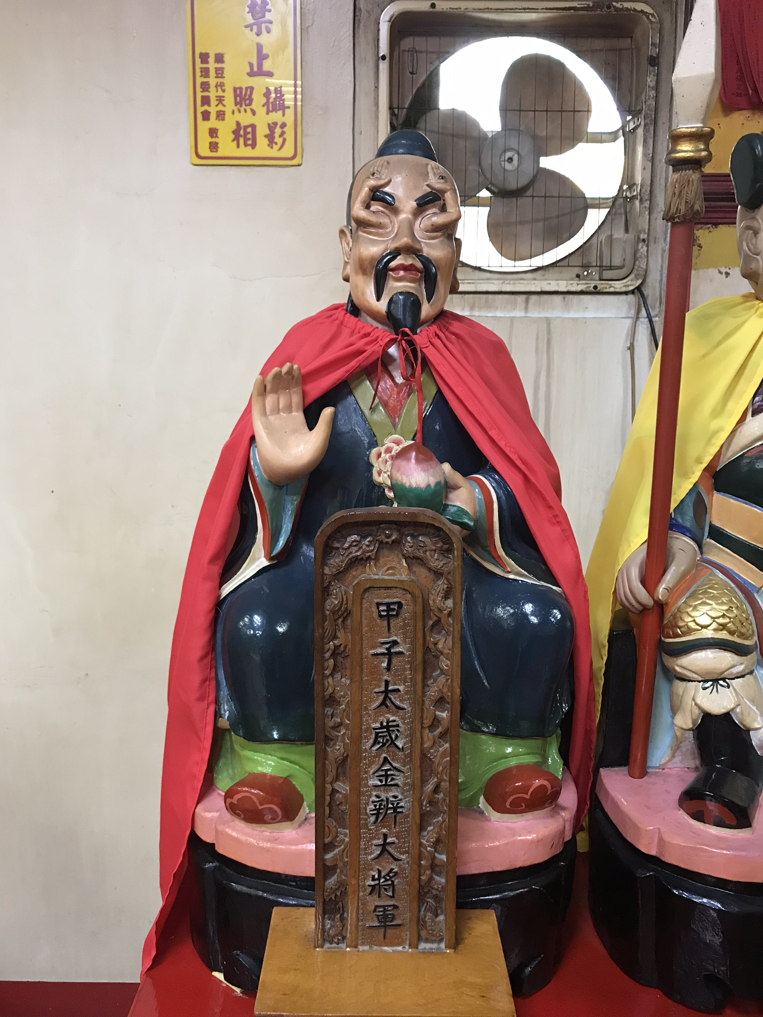 麻豆代天府甲子太歲金辨大將軍神像